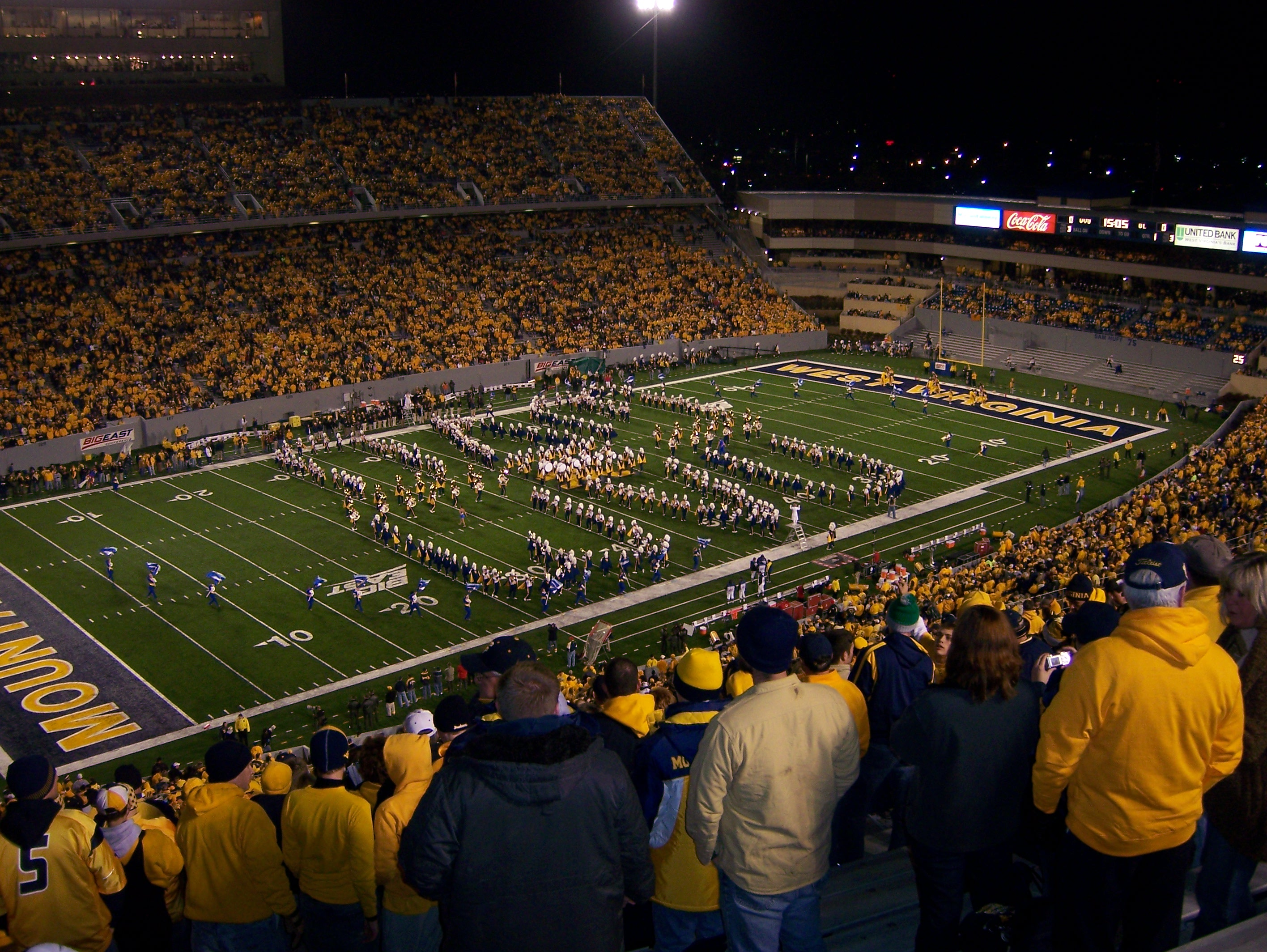 WVU Opening game at Mountaineer Field at Milan Puskar Stadium